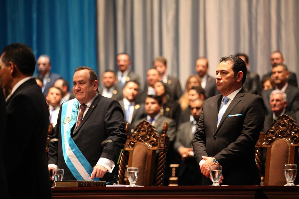 Alejandro Giammattei y Jimmy Morales en la Transmisión de Mando Presidencial.